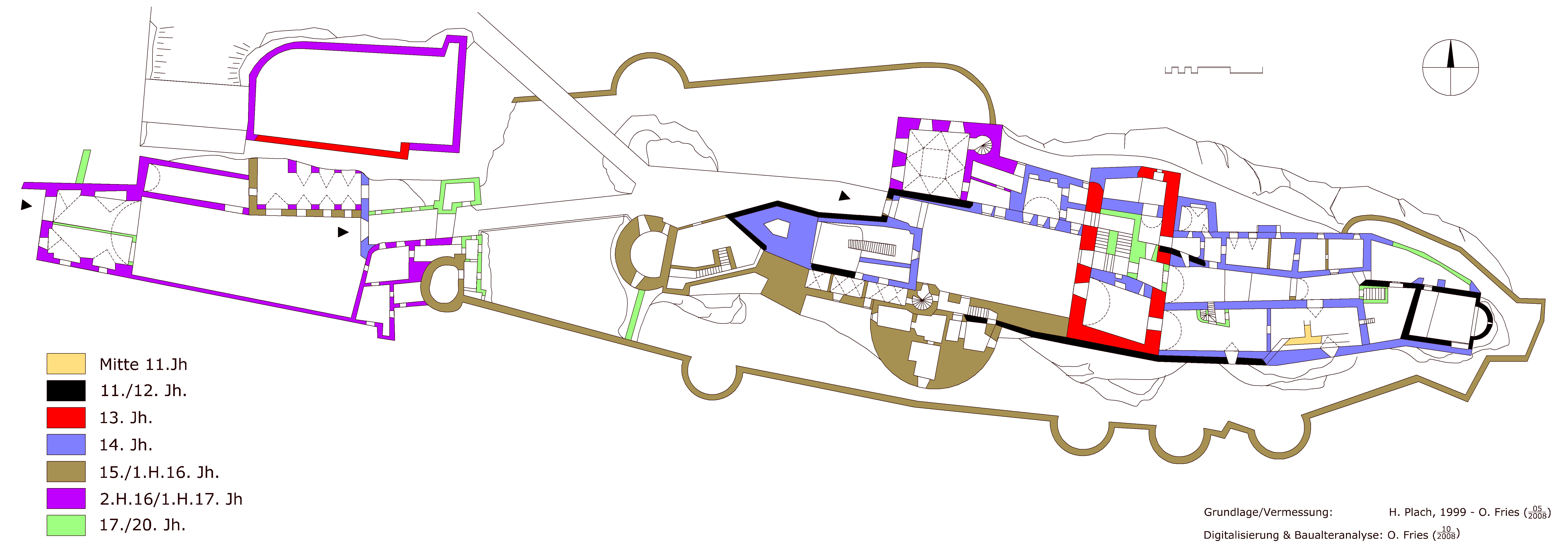 Baualterplan der Burg Raabs an der Thaya (2009) von Oliver Fries